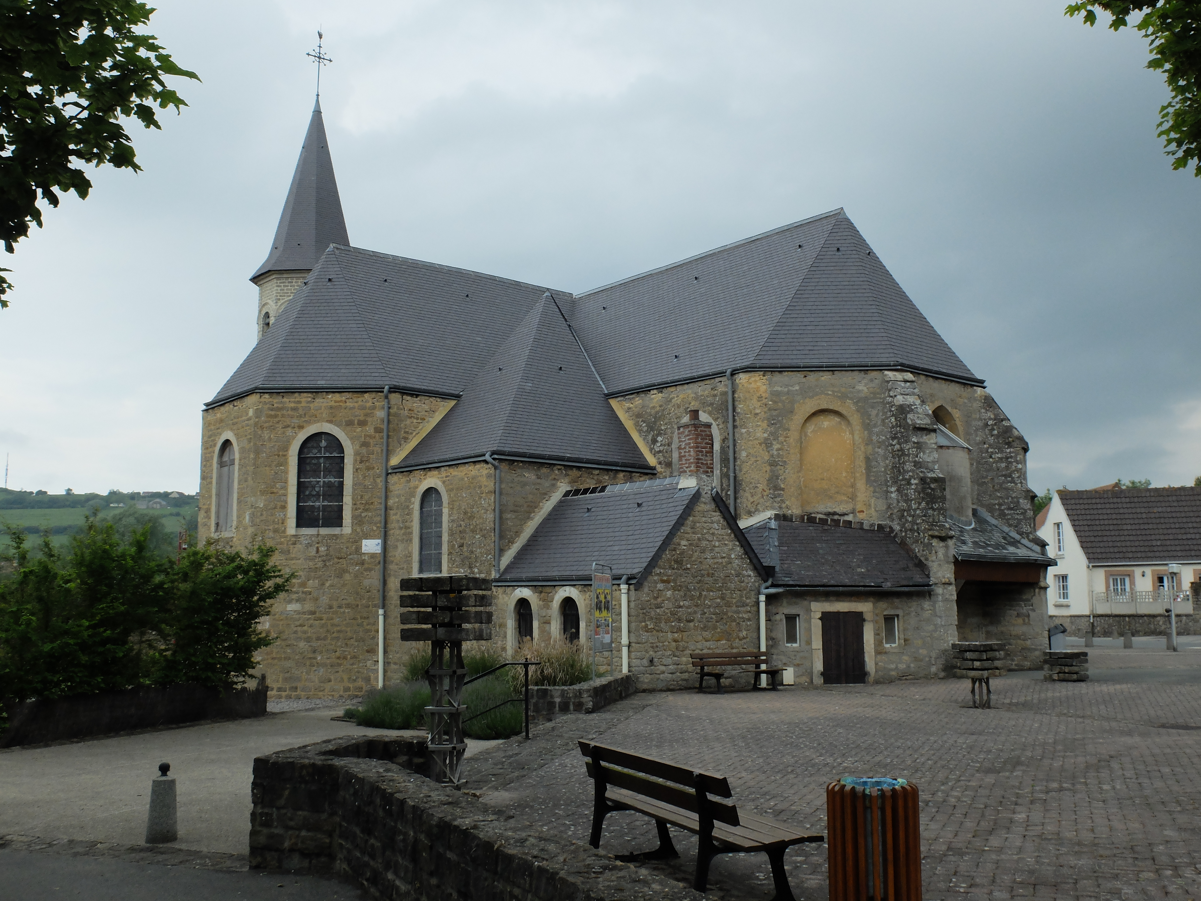 Vue de l'église Saint-Martin de Baincthun.